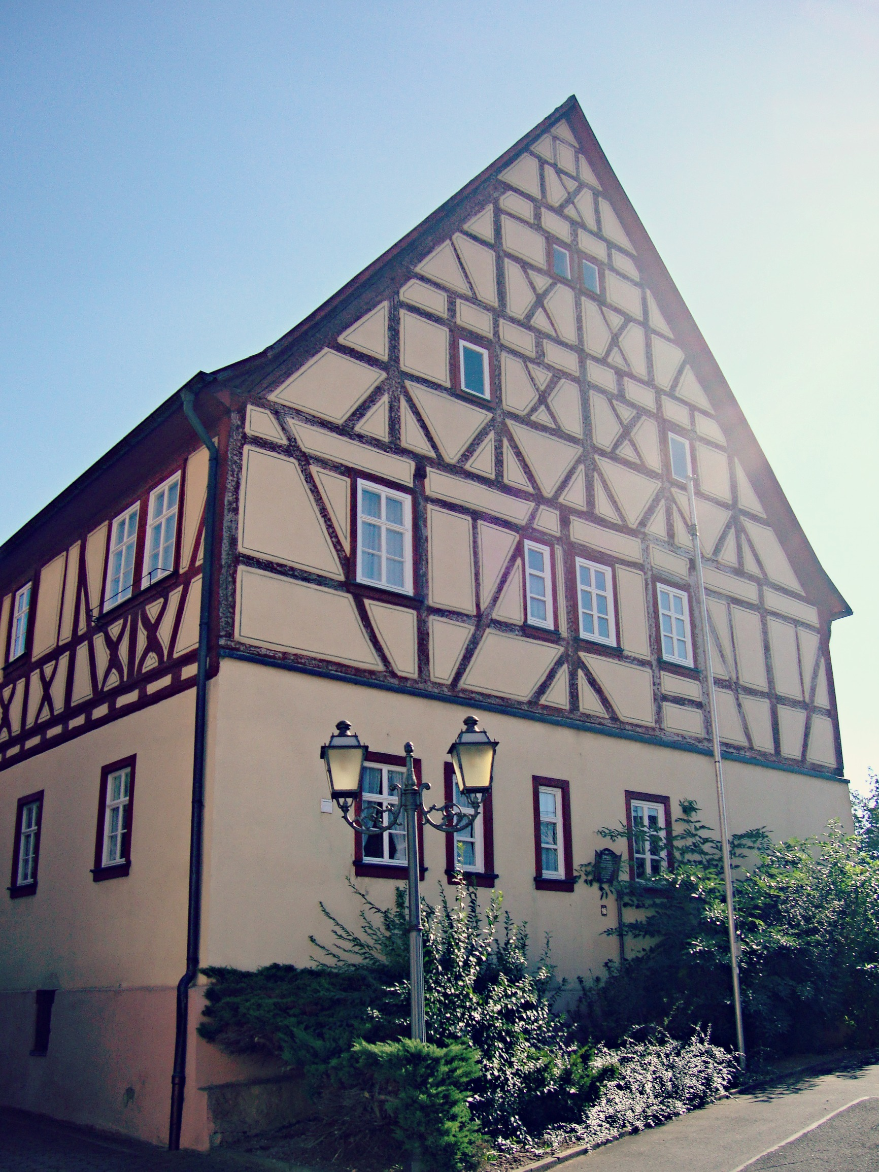 Untererthal, Johann-Nepomuk-Straße 14 Ehem. Pfarrhaus, zweigeschossiger Fachwerkbau mit massivem Erdgeschoss und Satteldach, von Laurenzius Koch, 1668-69This is a photograph of an architectural monument.